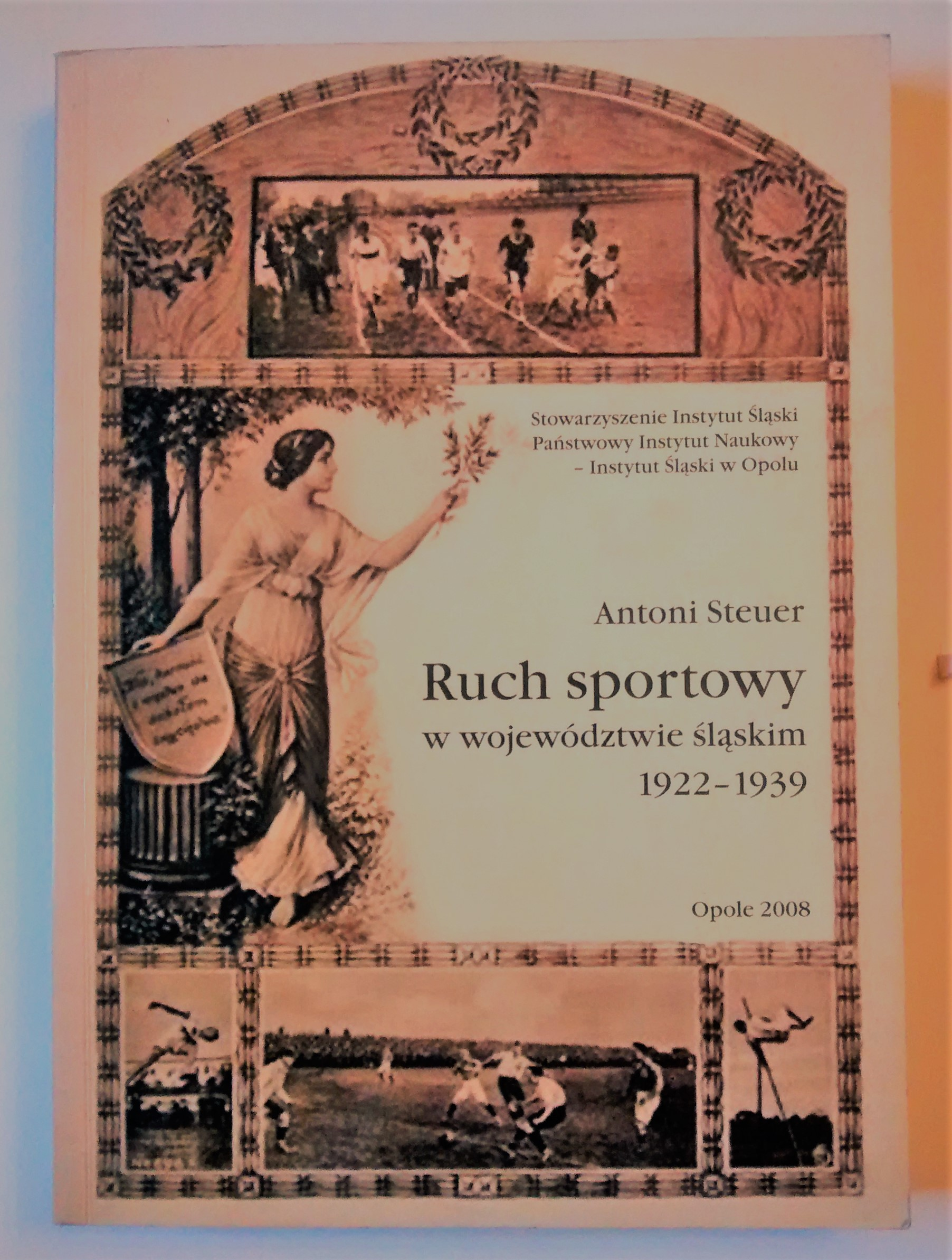 Publikacja "Ruch sportowy w województwie śląskim 1922–1939" - autor: Antoni Steuer. Książka wydana w 2008 r., wydawnictwo: Instytut Śląski Sp. z o.o.